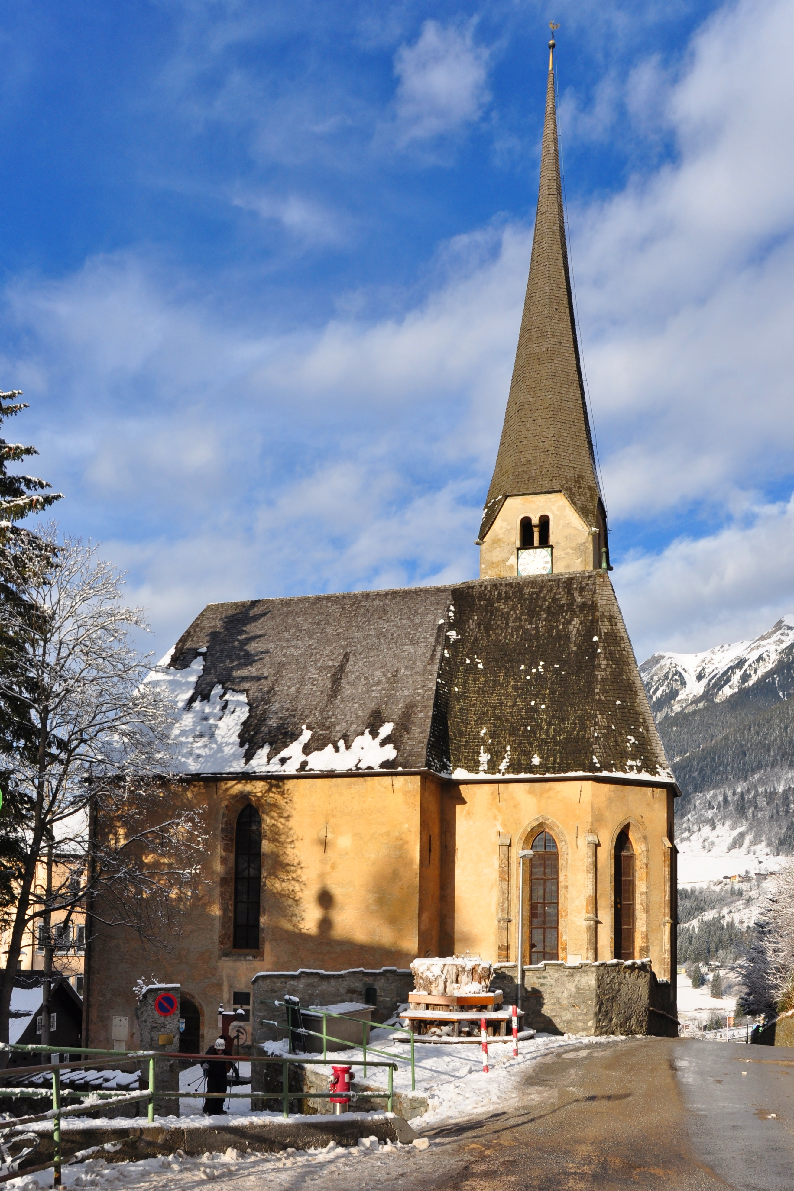 Filialkirche zum hl. Nikolaus in Bad Gastein. Die Nikolauskirche gilt als ältestes Bauwerk des Gasteinertals.